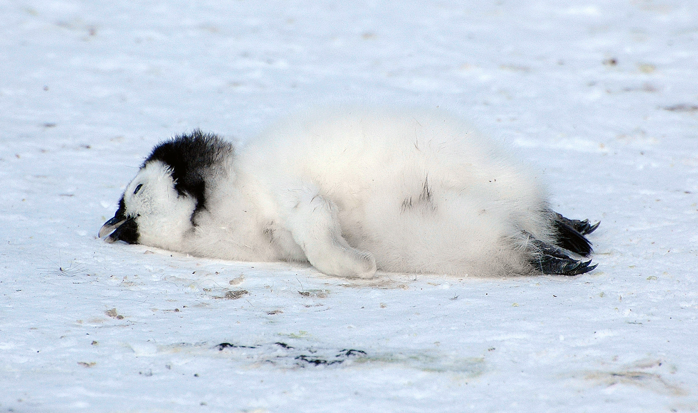 Dead baby emperor penguin